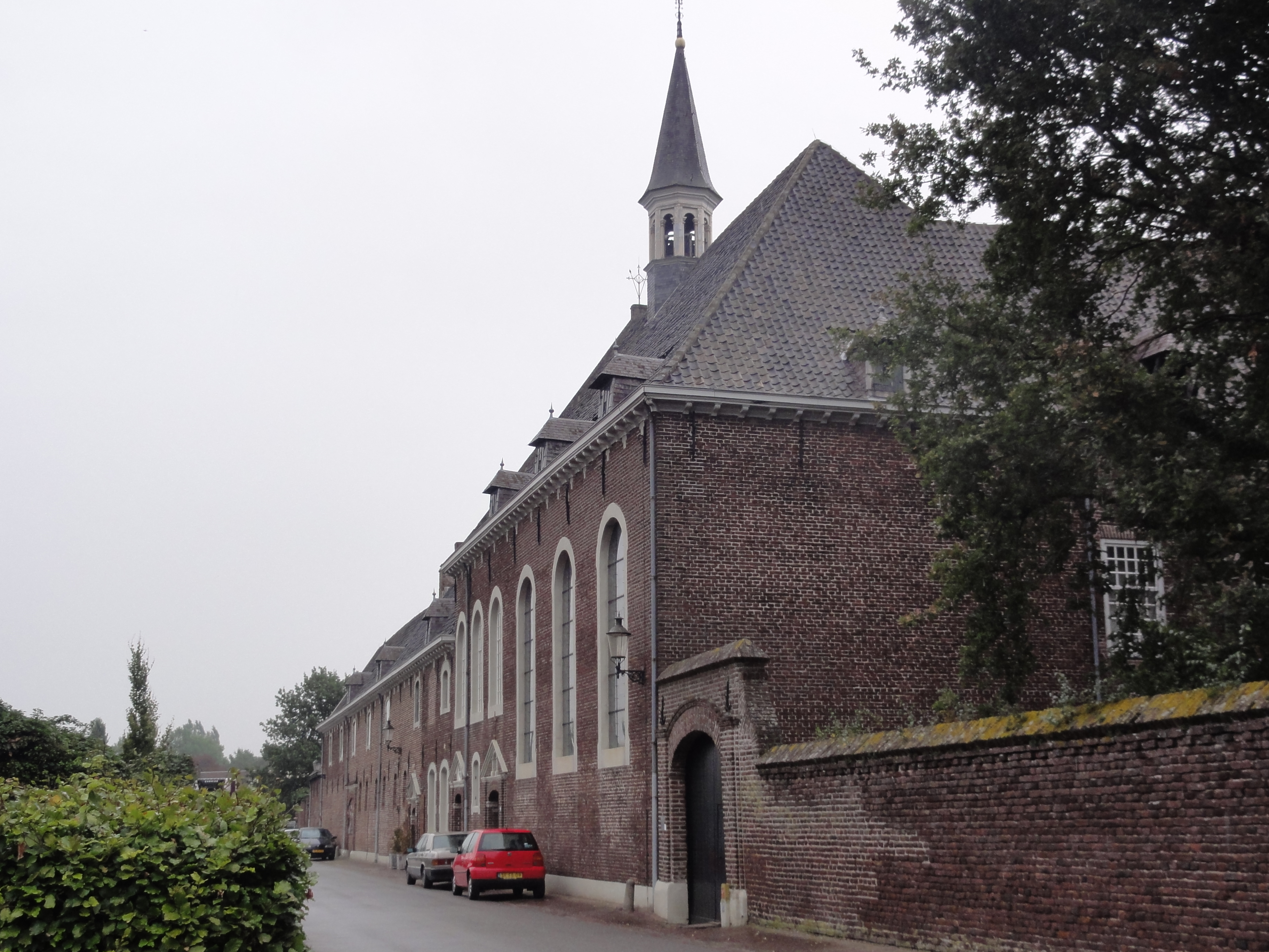 Boxmeer Rijksmonument 10027 klooster Elzendaal, straatzijde 98″ N, 5° 56′ 38.94″ E